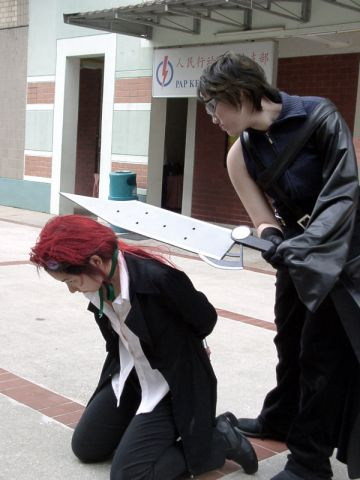 Cosplayers vestidos como personajes de Final Fantasy VII: Advent Children.